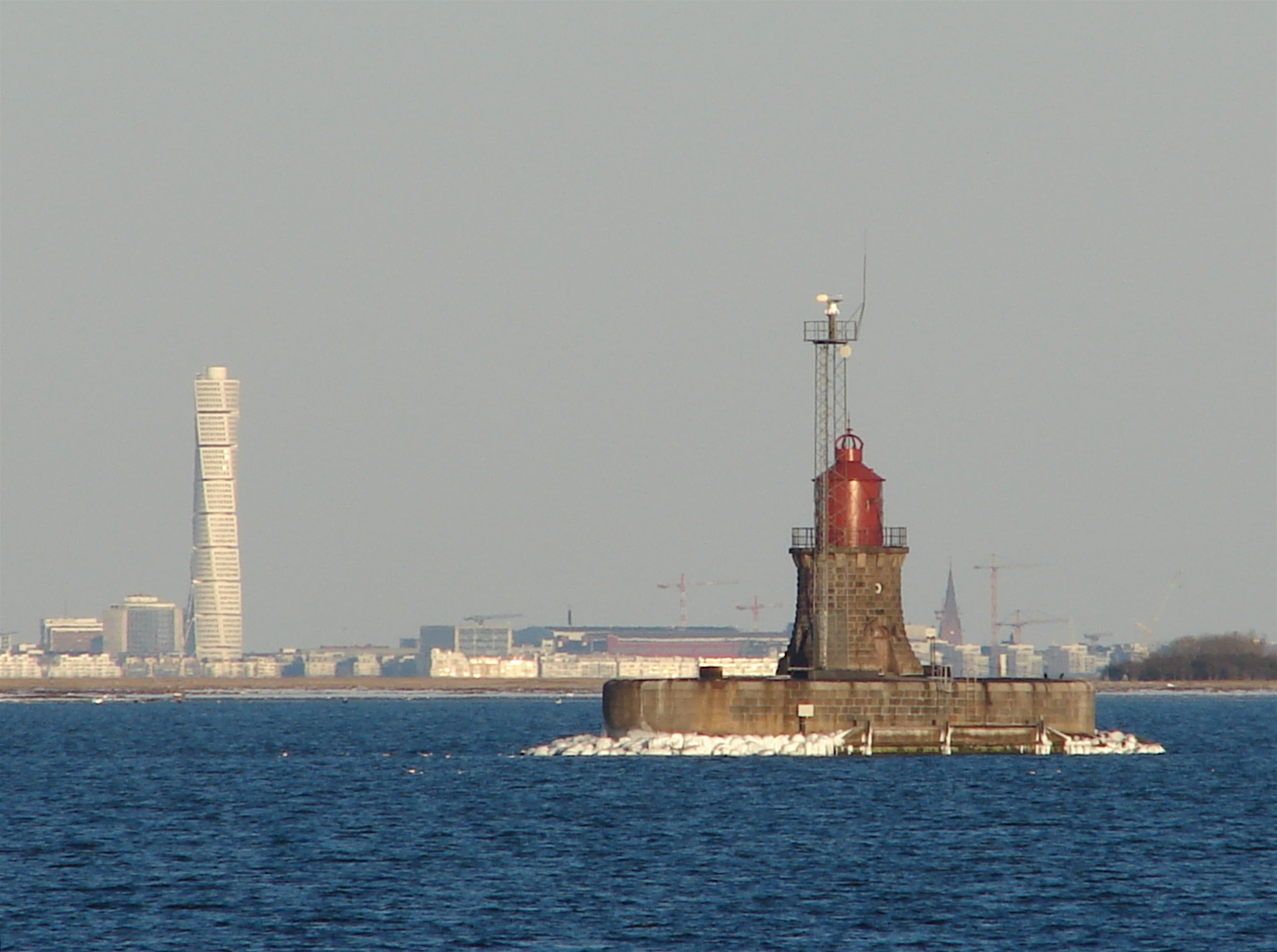 Nordre Røse udenfor Kastrup, med Malmøs Turning Torso i baggrunden til venstre, set fra Kastrup, Amager